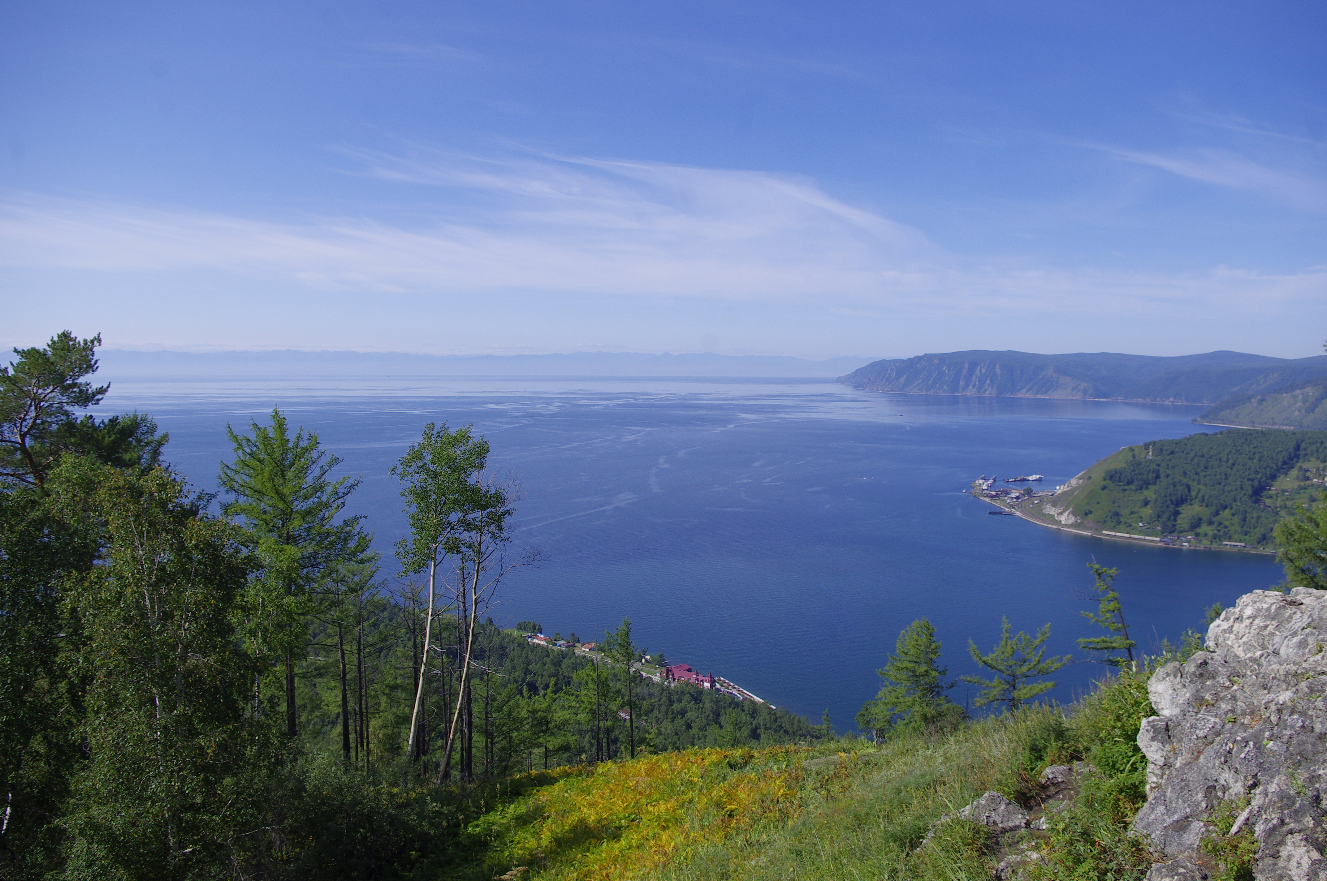 Lato 2013.